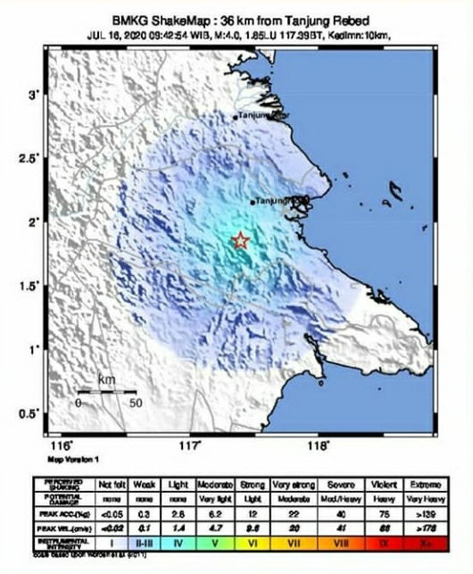 Ini adalah peta Guncangan gempa bumi yang terjadi di Tanjung Redeb Berau Kalimantan Timur